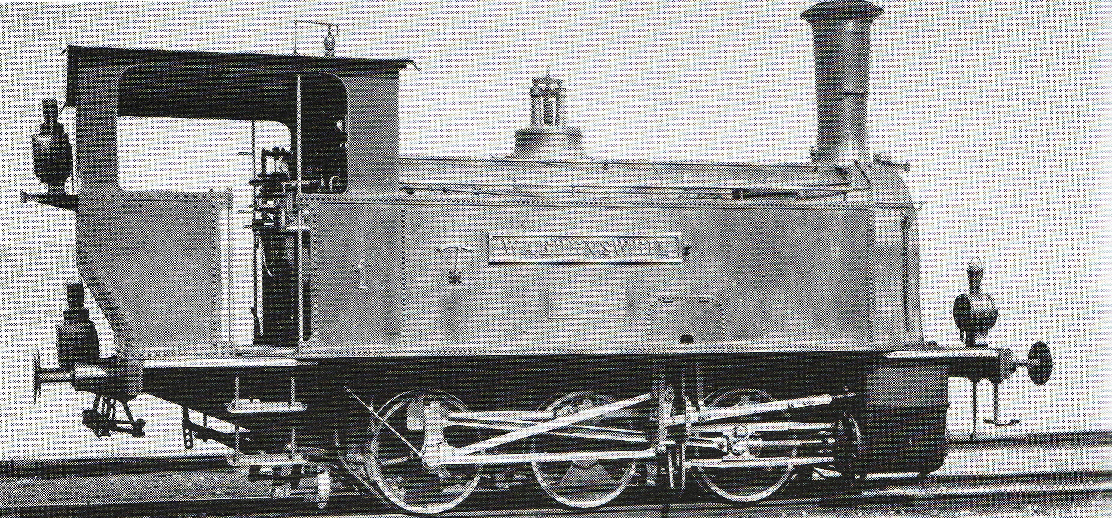 Tender-Locomotive E 3/3 Nr. 1 Waedensweil der Schweizeriſchen Südoſtbahn, gebaut 1878 inn Emil Keſslers Machines-Fabrique zů Eſslingen (Fabr.-Nr. 1722) für die Wädenswil—Einſideln-Bahn, 1891 an die Schweizeriſche Südoſtbahn, 1895 mit neuem Keſſel ausgeſtattet, 1940 außer Dienſt geſtellt und anſchließend abgebrochen.